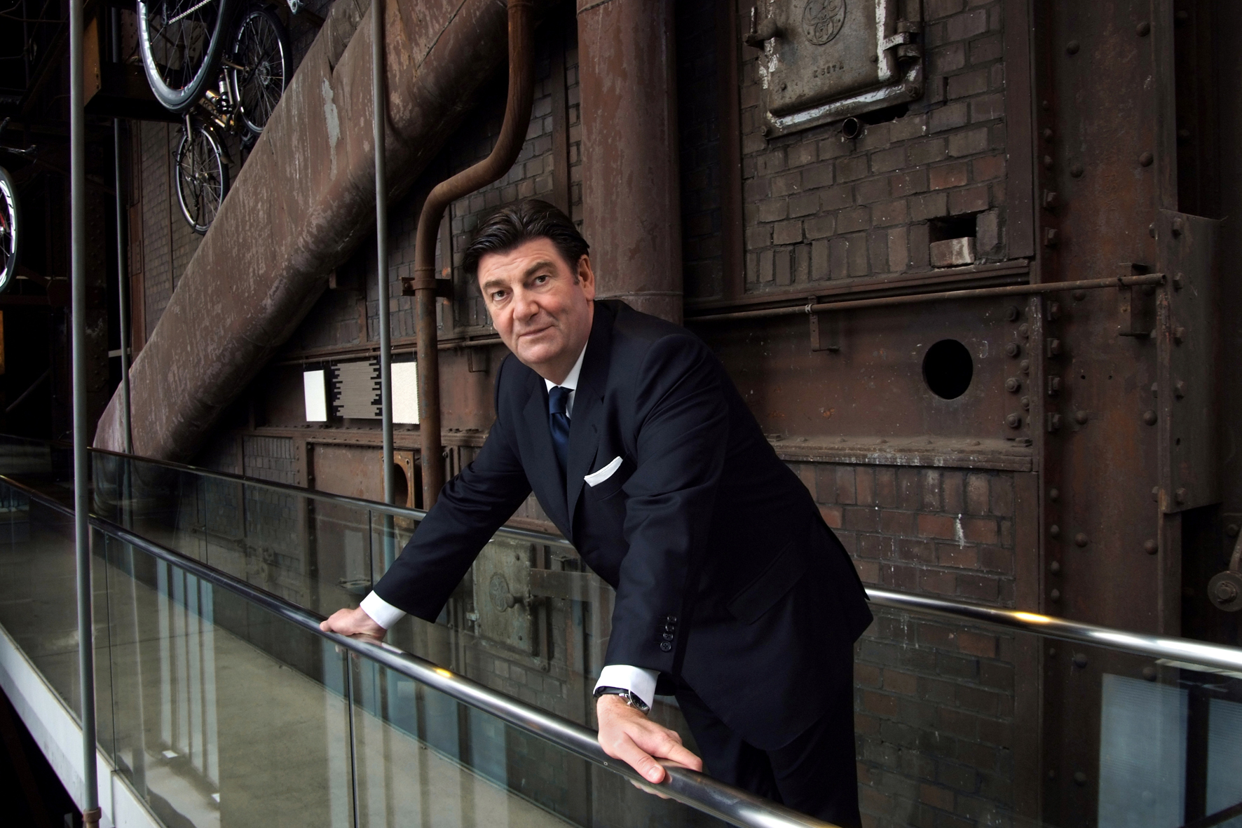 Peter Zec, Initiator und CEO von Red Dot